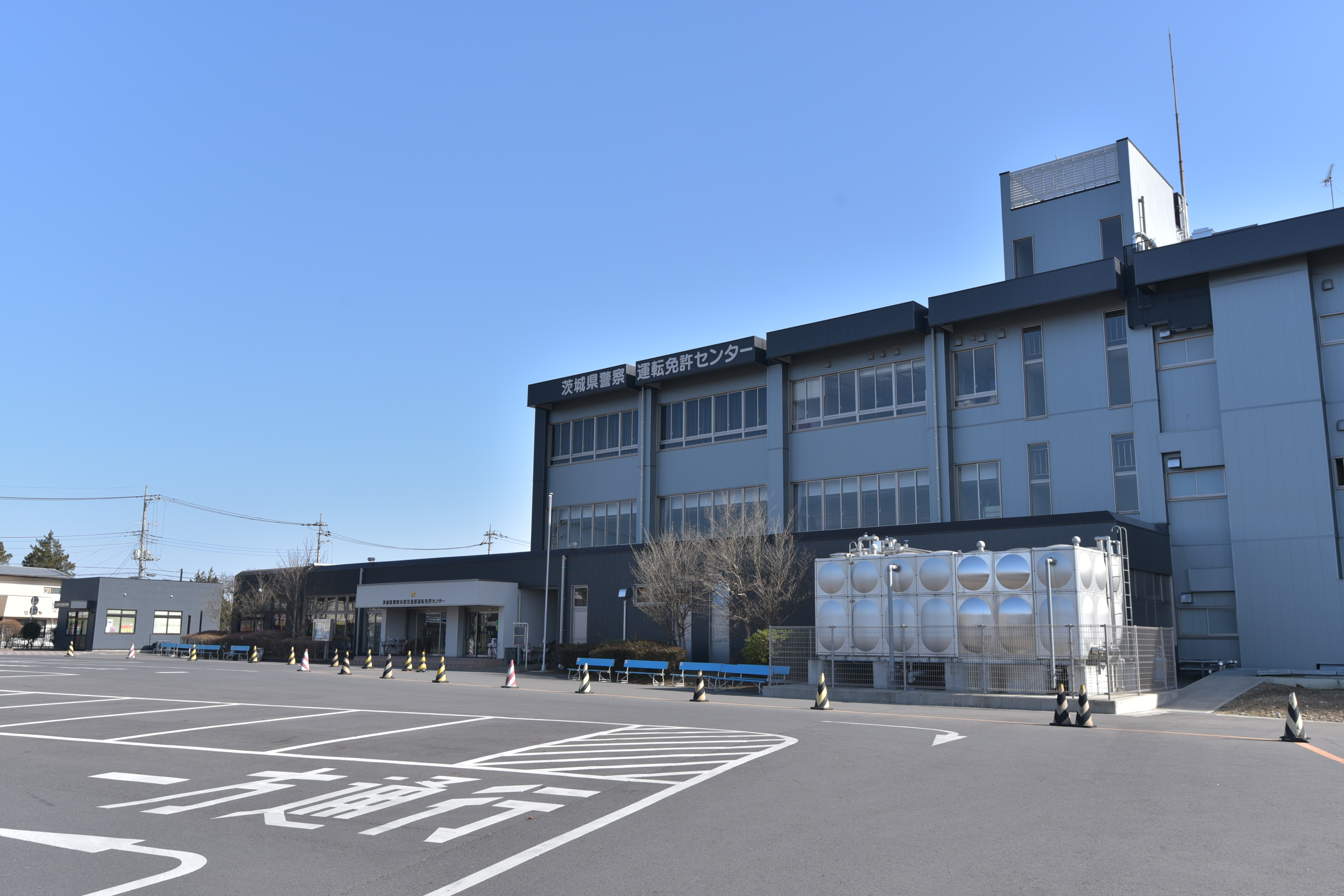 茨城県警察運転免許センターの建物 Nikon D750